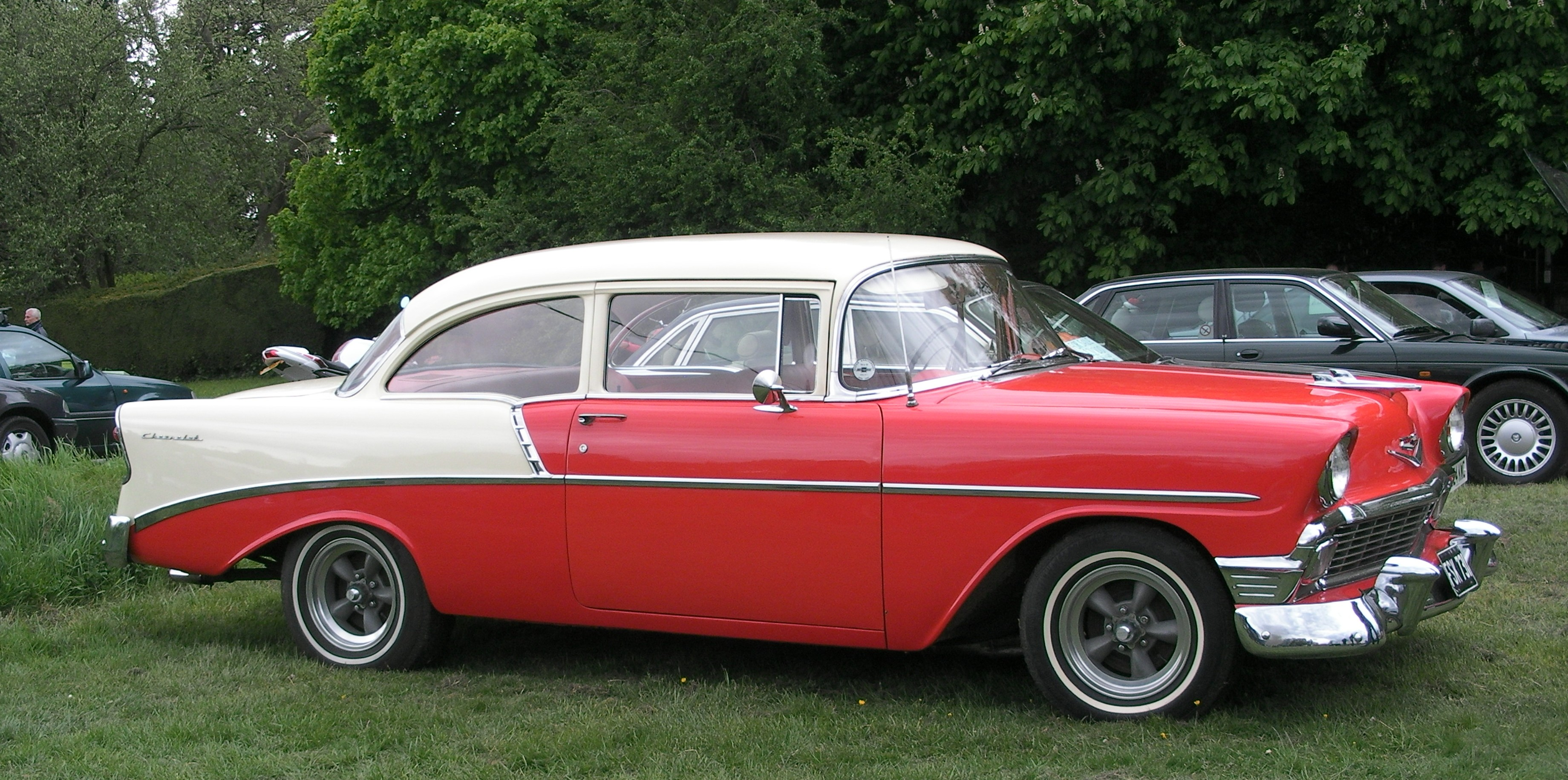 1956 Chevrolet 210